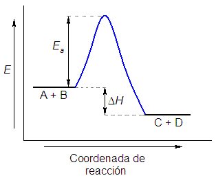 Potential energy diagram. Diagrama de energía potencial.